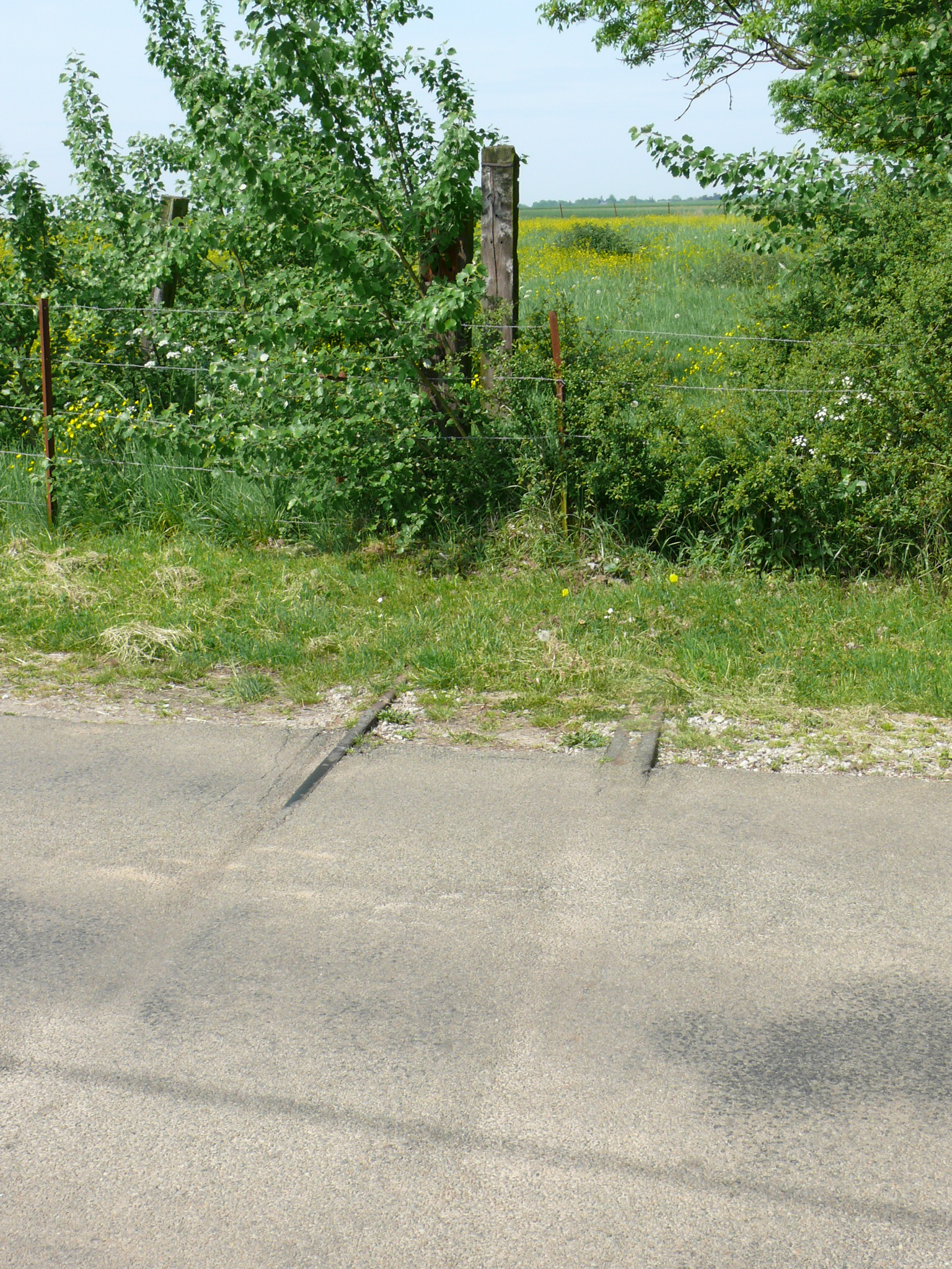 Froissy (Oise - Picardie - France) (rue de la Plaine, près de la RD 151) : Ancien passage à niveau à voie métrique, l'un des seuls vestiges subsistants de la ligne de chemin de fer secondaire Estrées-Saint-Denis - Froissy - Crèvecœur-le-Grand